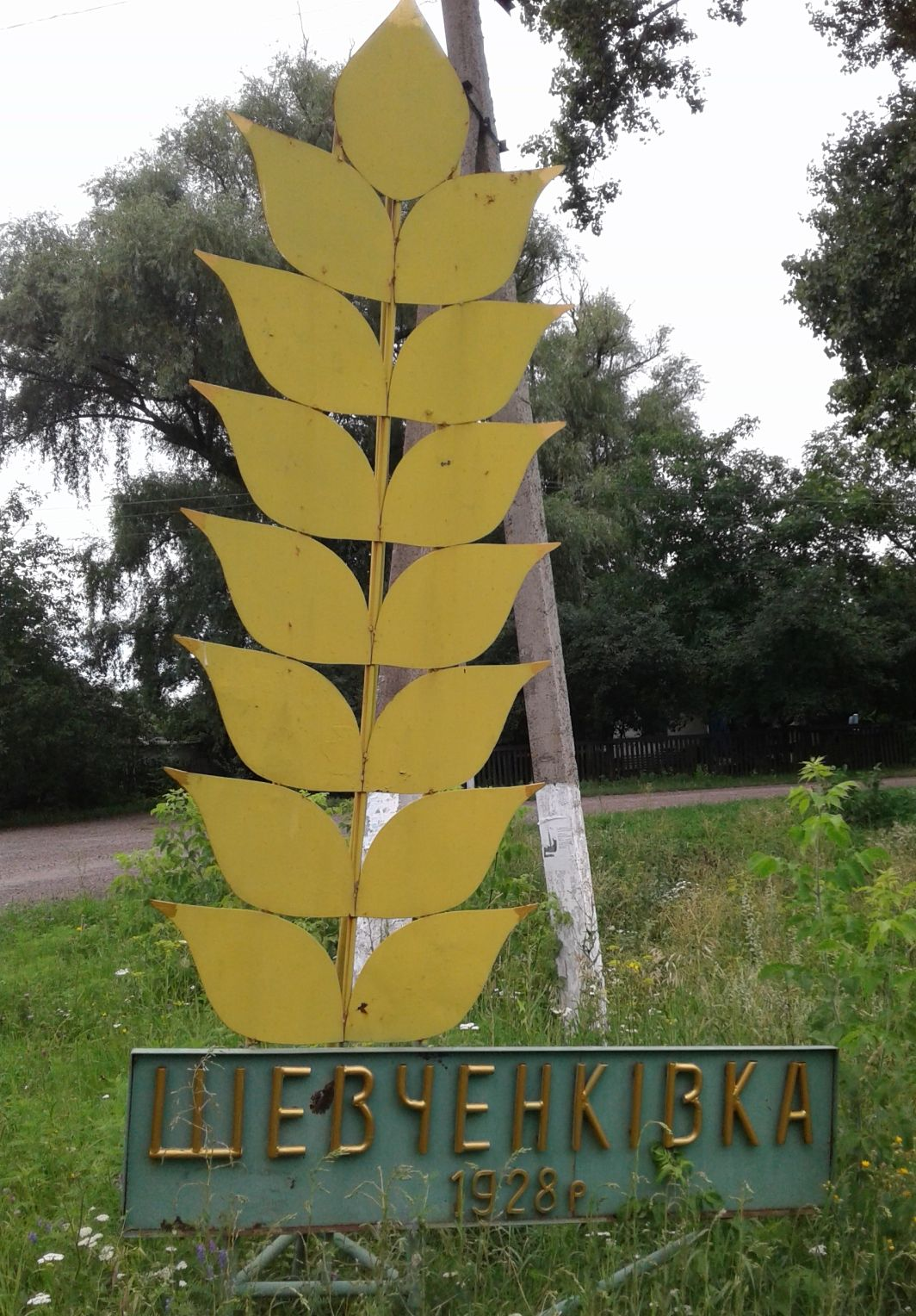 Пам'ятний знак про заснування села Шевченківка Васильківського району Київської області